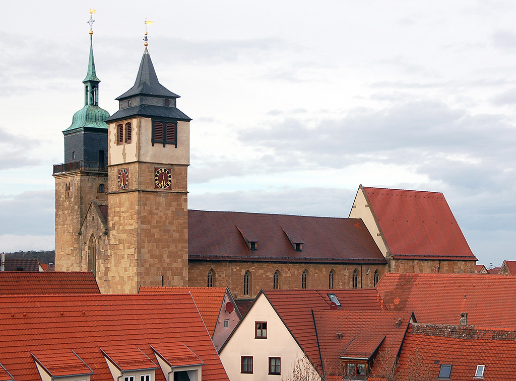 Bartholomäuskirche in Markgröningen vom Turm des Heilig-Geist-Spitals